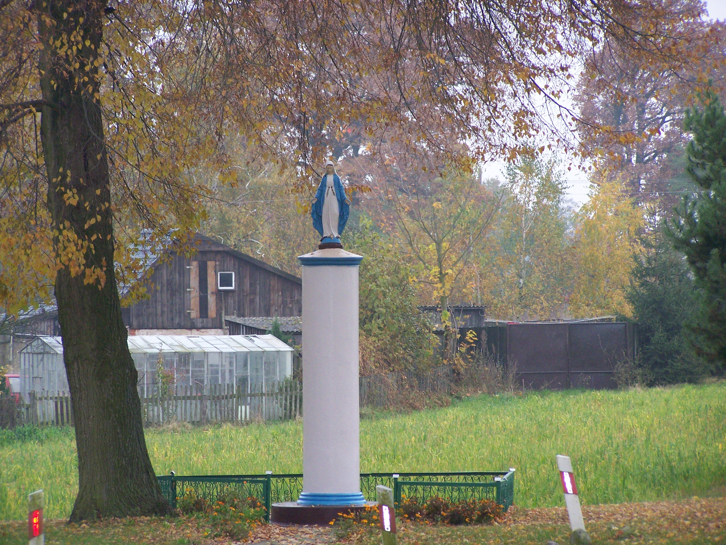 Gołaszewo - crossing